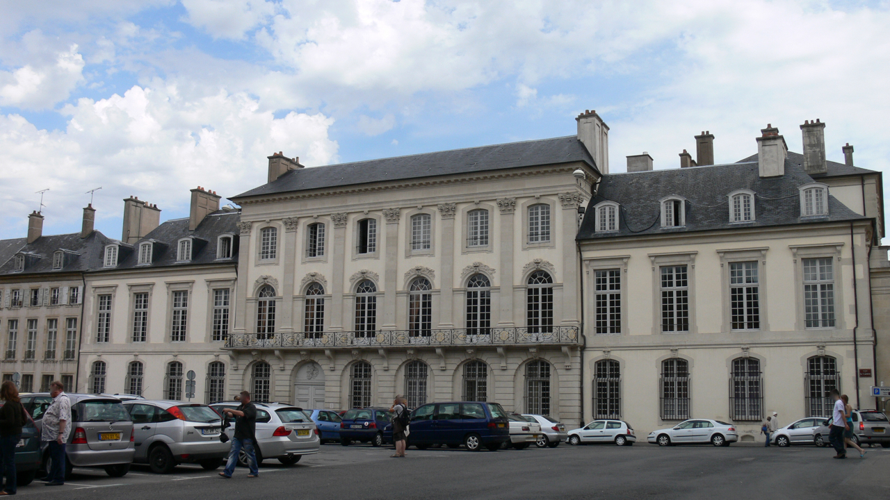 Hôtel de Beauvau ou Hôtel de Craon, place de la Carrière, Nancy, Lorraine, France